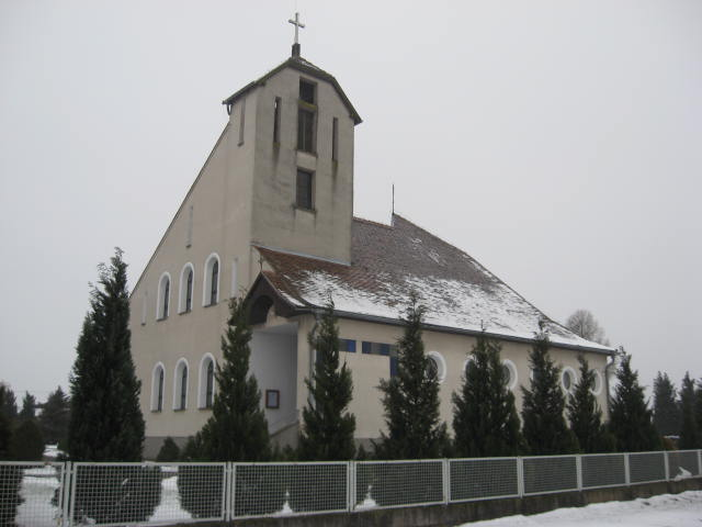 Kościół Świętych Piotra i Pawła w Wierzchach